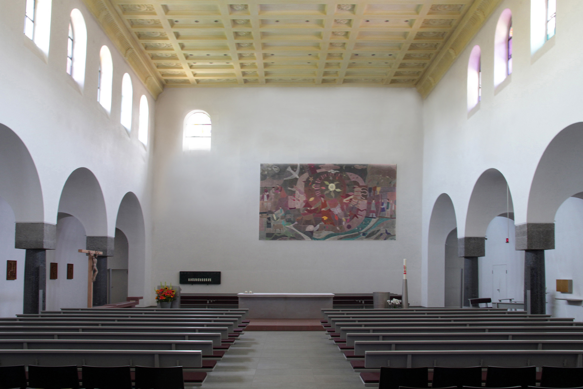 Römisch-katholische Pfarrkirche St. Franziskus Zürich-Wollishofen Innenraum von 2004 nach Osten gesehen